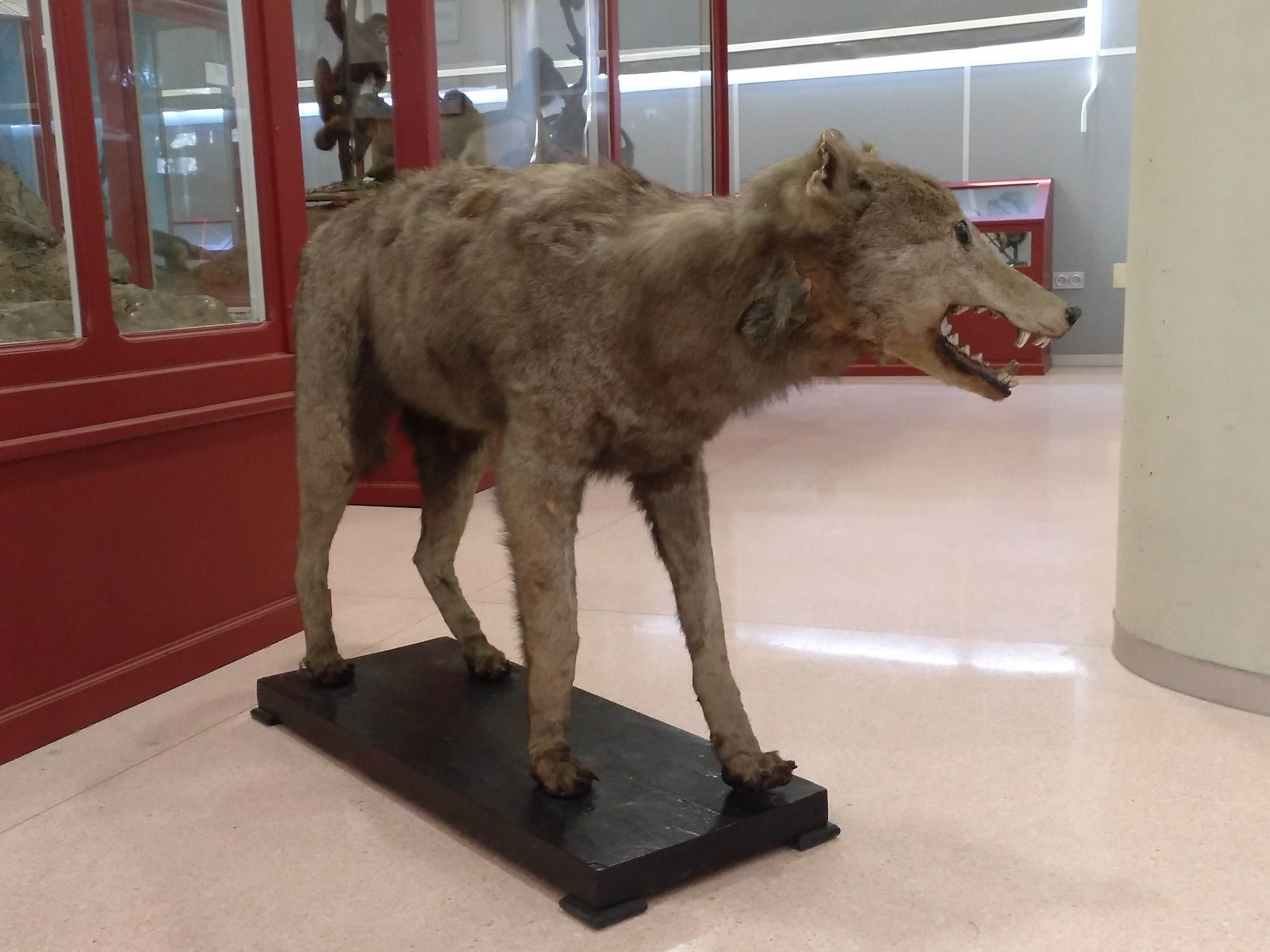 Posible ejemplar de lobo ibérico levantino (canis lupus deitanus) en el Museo Alfonso X el Sabio (MusaX) de Murcia